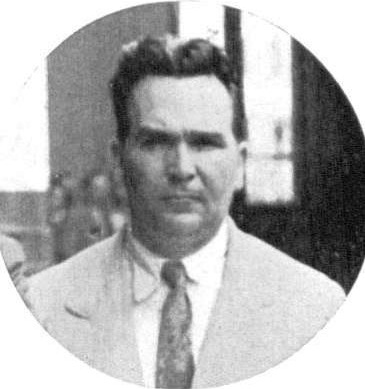 El dirigente argentino Atilio Cattaneo.